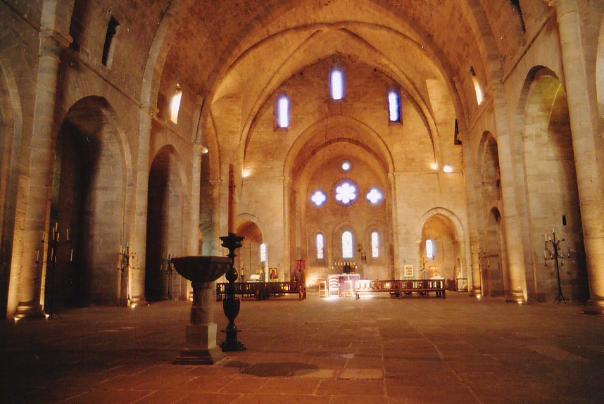 Le sanctuaire, percé de 7 baies, est relié à la nef voûtée en berceau brisé par la croisée du transept dont les épais tores saillants représentent une expérimentation de la croisée d'ogives en France méridionale.